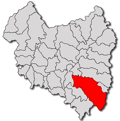 Categorie:Hărţi ale judeţului Covasna